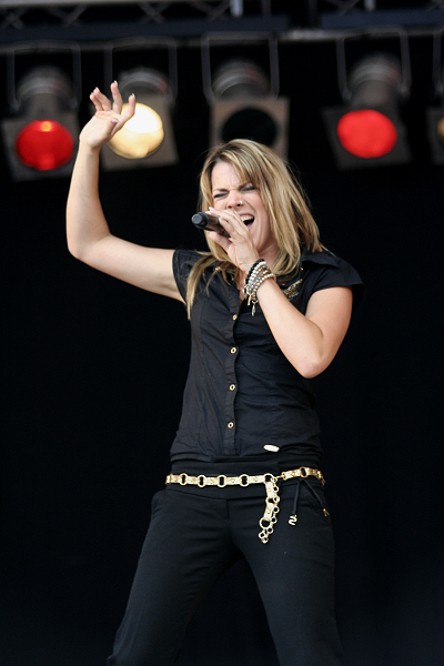 Nikki Kerkhof tijdens Vlaggetjesdag (2008)